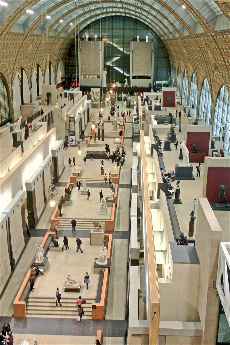 La grande nef du musée d'Orsay L'aménagement intérieur initial du musée fut réalisé par une équipe de scénographes et d'architectes sous la direction de Gae Aulenti. Avec Italo Rota, Piero Castiglioni (consultant pour l'éclairage), et Richard Peduzzi (pour la présentation de l'architecture), Gae Aulenti s'est attachée à créer une présentation unifiée à l'intérieur d'une grande diversité de volumes, notamment par l'homogénéité des matériaux utilisés : revêtement de pierre au sol et sur les murs. Cet aménagement répond à la démesure du volume de l'ancienne gare. (extrait du site officiel)